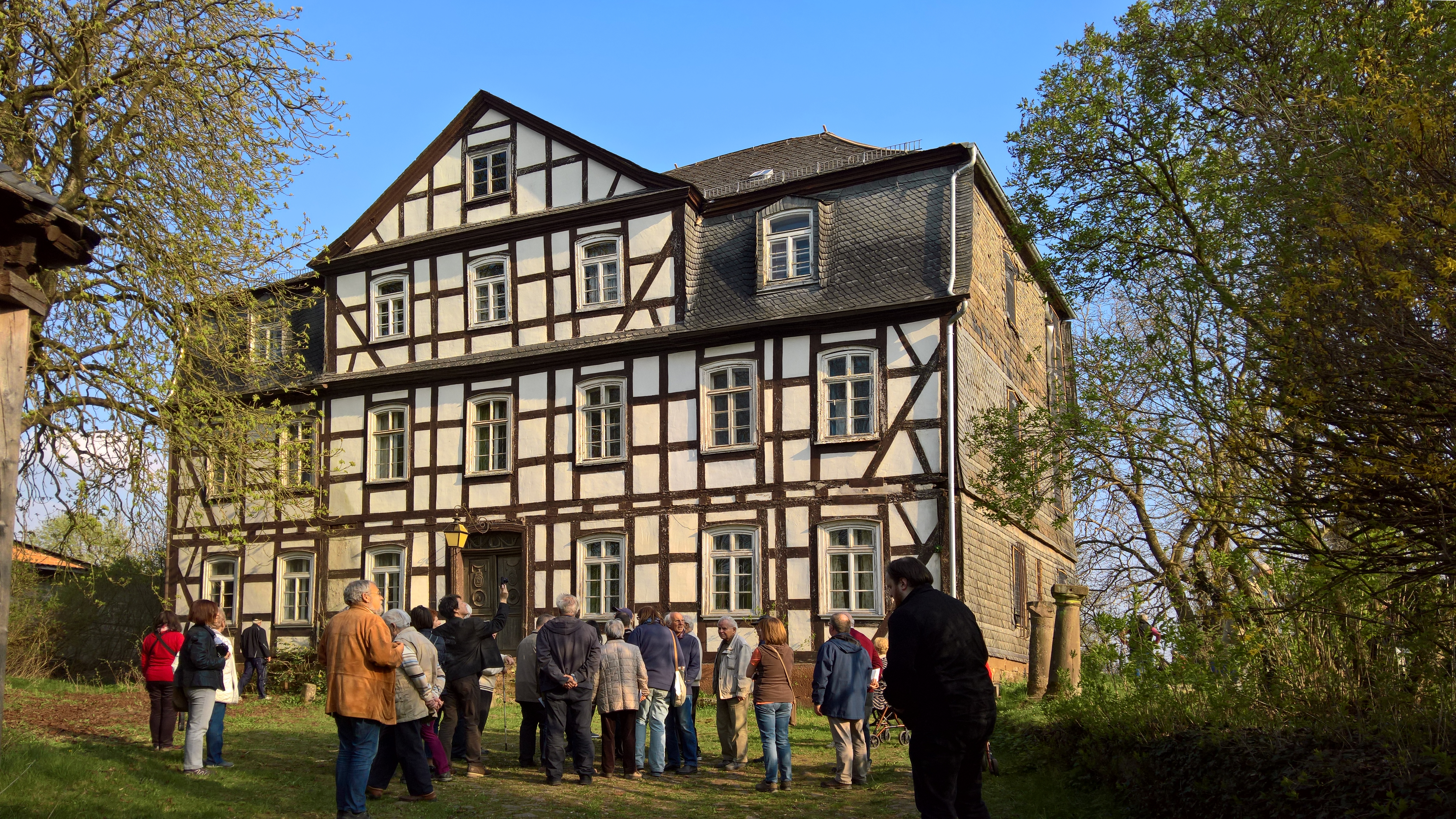 Eingang zum Schloss - Fachwerkbau - Eingang